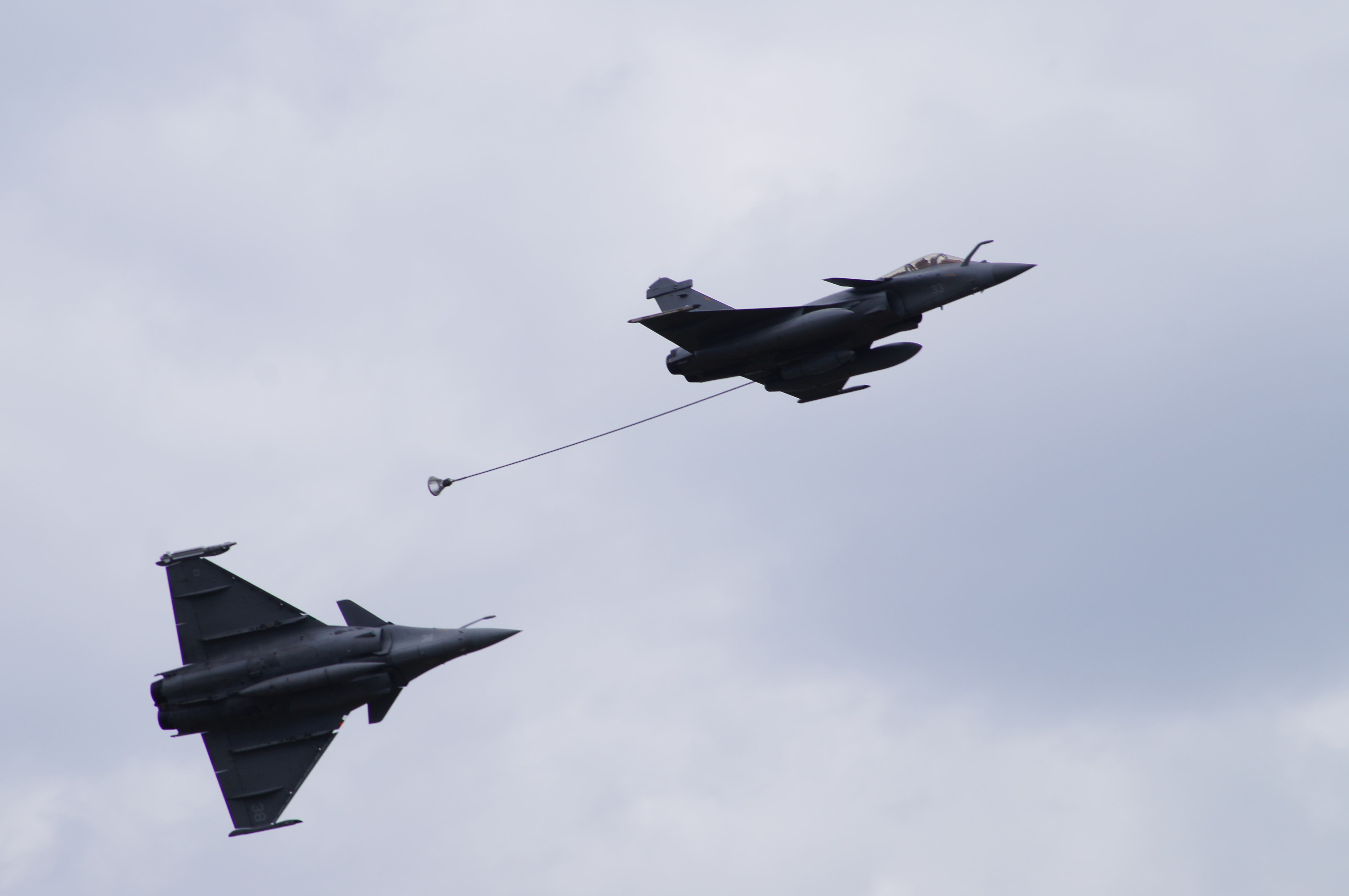 Rafale M en configuration Nounou - vol de démonstration au meeting de La Ferté Alais - 2014